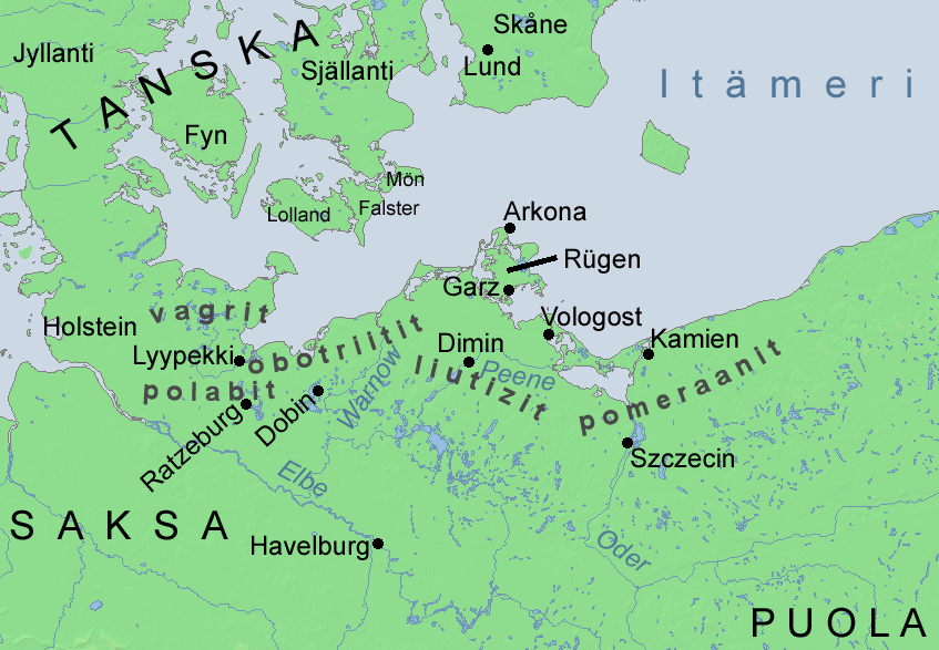 Map of Vendish crusades. Kartta ristiretkistä vendejä vastaan.